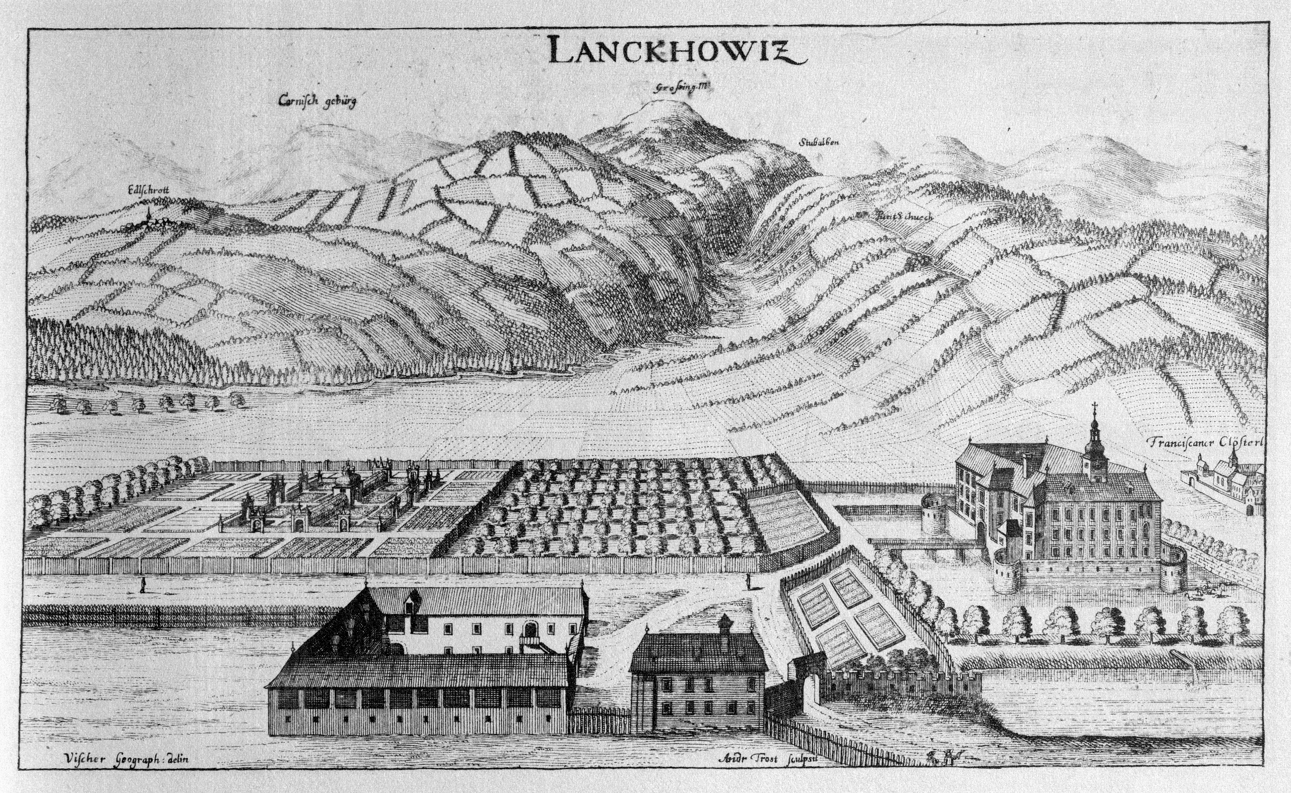 G. M. Vischers Käyserlichen Geographi, Topographia Ducatus Stiriae, Das ist: Eigentliche Delineation / und Abbildung aller Städte / Schlösser / Marcktfleck / Lustgärten / Probsteyen / Stiffter / Clöster und Kirchen / so es sich im Herzogthumb Steyrmarck befinden; Und anjetzo Umb einen billichen Preyß zu finden seynd Bey Johann Bitsch Universitäts Buchhandlern / Auff dem Juden=Platz bey der guldenen Saulen. Graz 1681 Die Nummerierung der Dateien folgt der alphabetischen Reihung der Ortsnamen